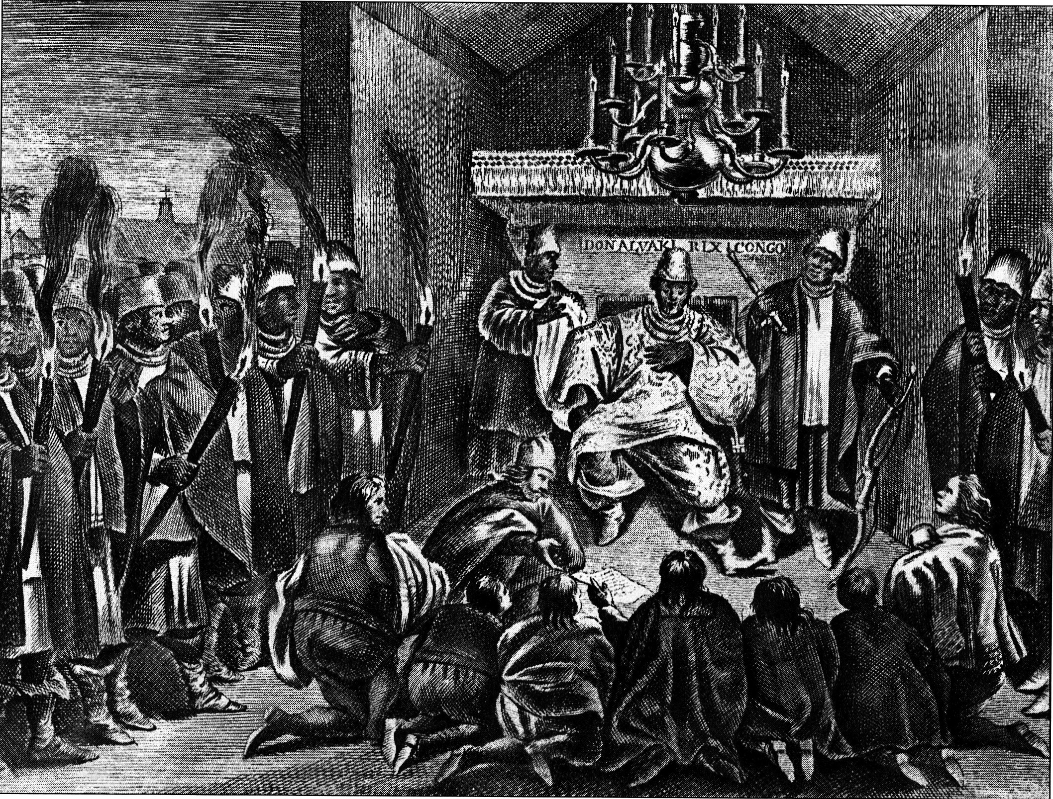 Gravure extraite de 0. Dapper. Description de l’Afrique, Amsterdam, 1686